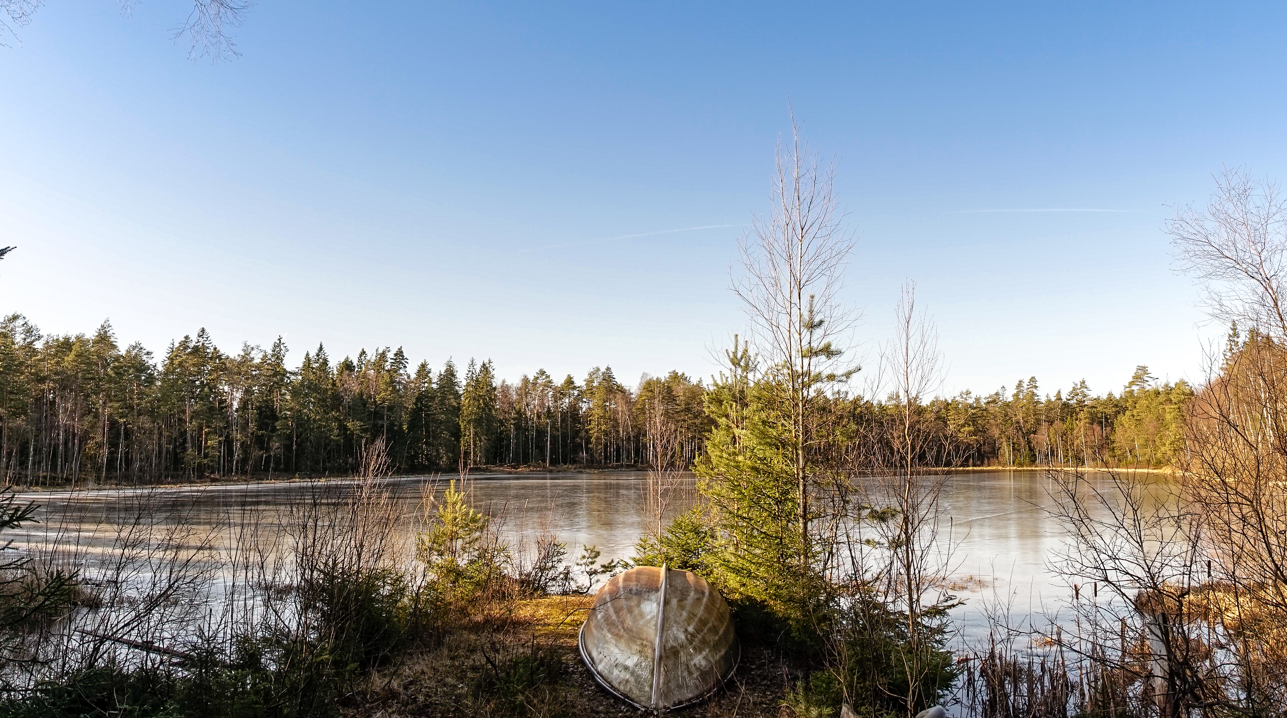 Uddagöl